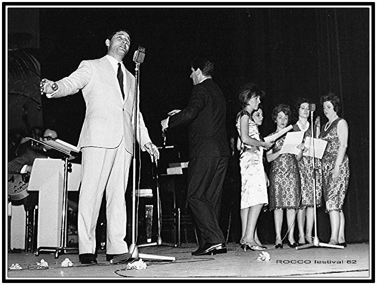 festival Sanremo italy 1962 final canta Rocco Montana eurovision final festival Sanremo 1962